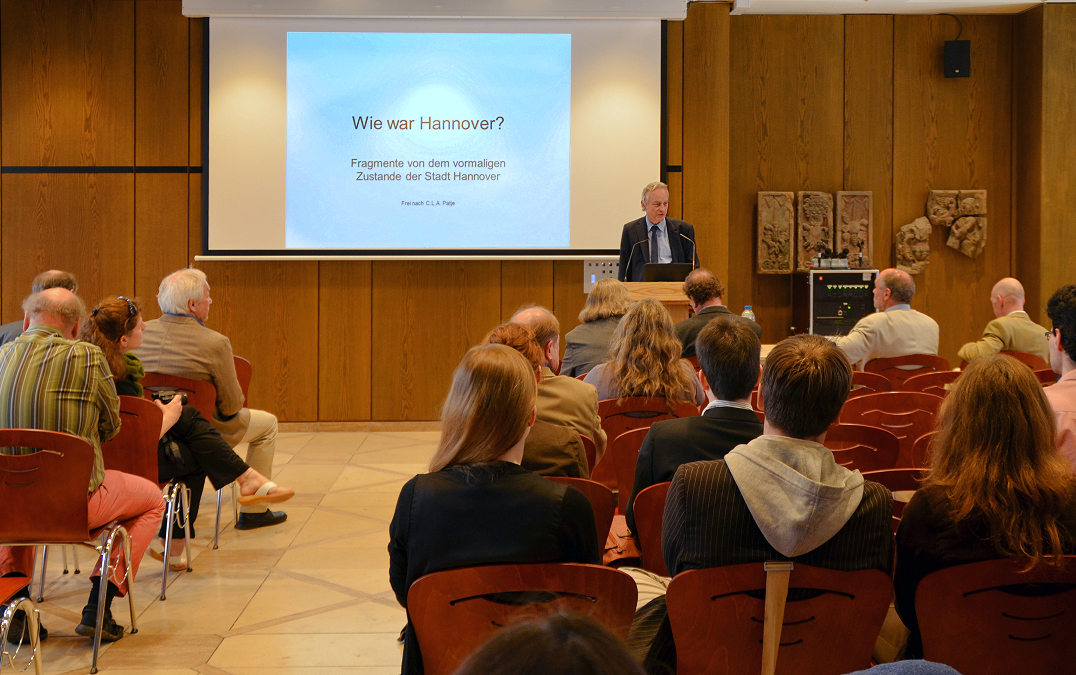 Vortragsverstaltung während der Jahrestagung der Archäologischen Kommission für Niedersachsen bei der Jahresversammlung 2014 in Hannover